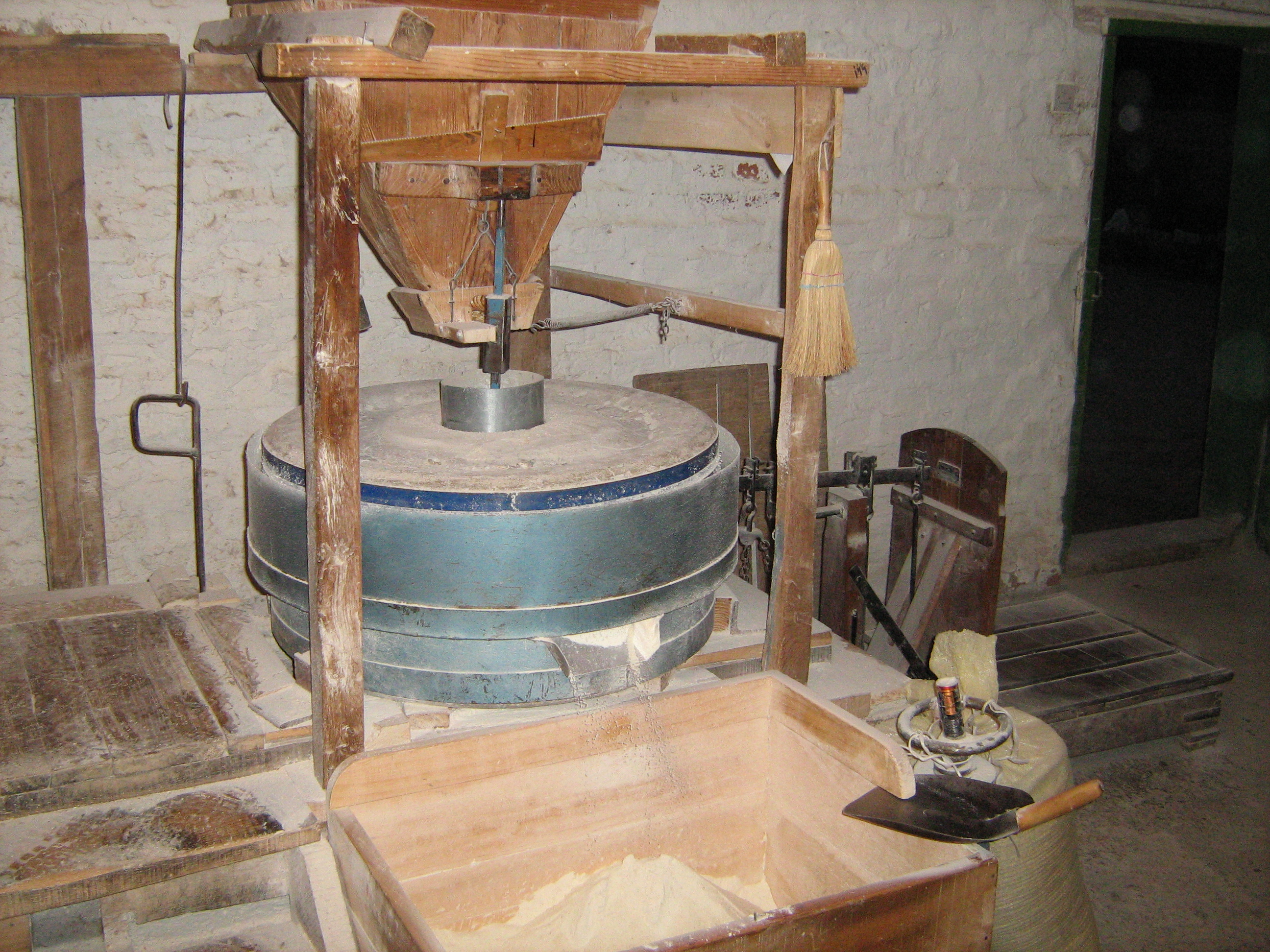 Стара воденица на реци Дичини, на путу од Такова ка Шаранима.